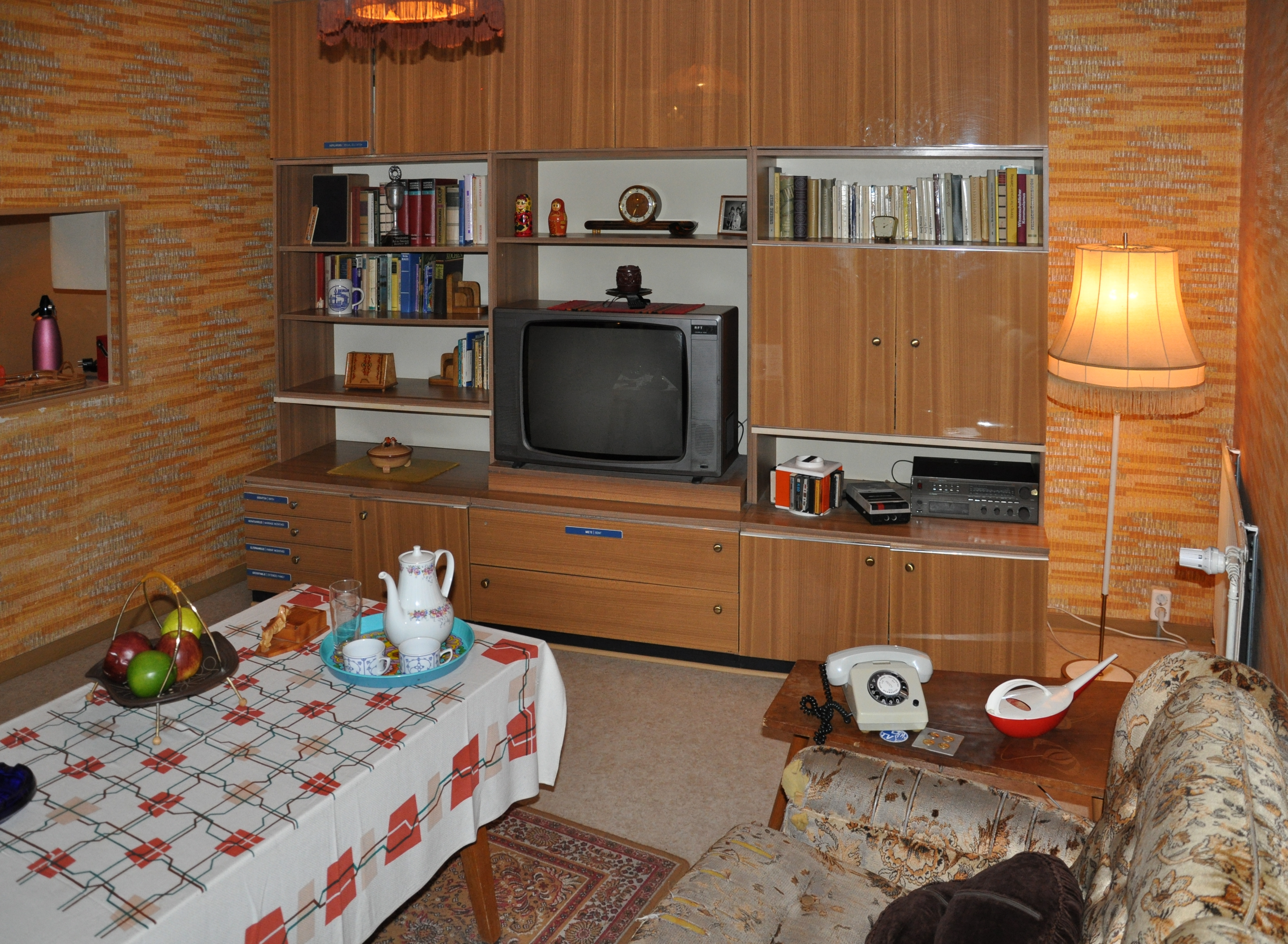 Typisches DDR-Wohnzimmer, fotografiert im DDR-Museum Berlin